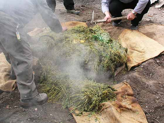 Pachamanca, destapando. Foto: Xauxa 2004 Categoría:Perú (imagen) Categoría:Imágenes GFDL Image:Pachamanca 4 - uncovering.jpg